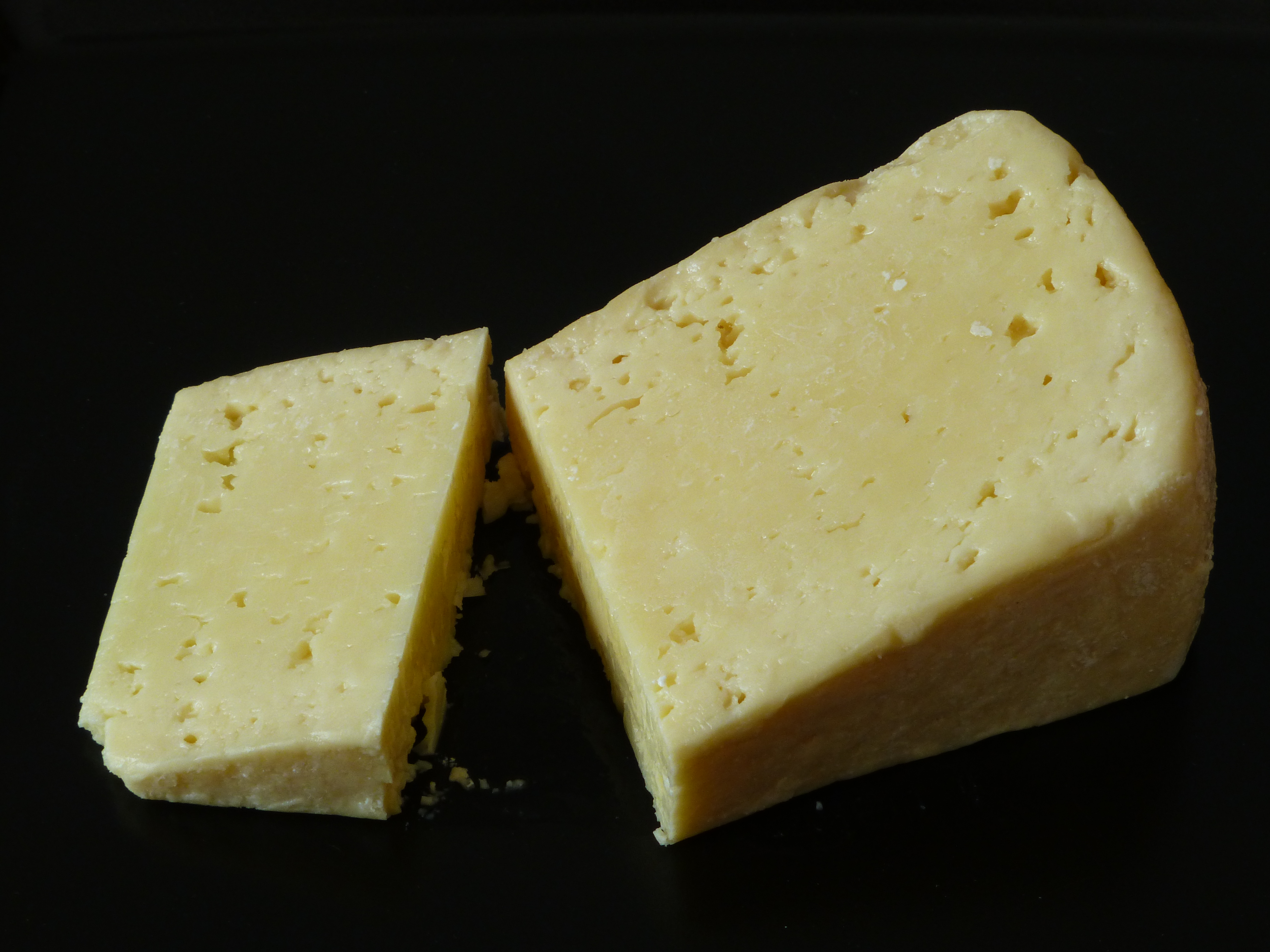 Räßkäse, ein würziger Käse aus Vorarlberg, angeschnitten